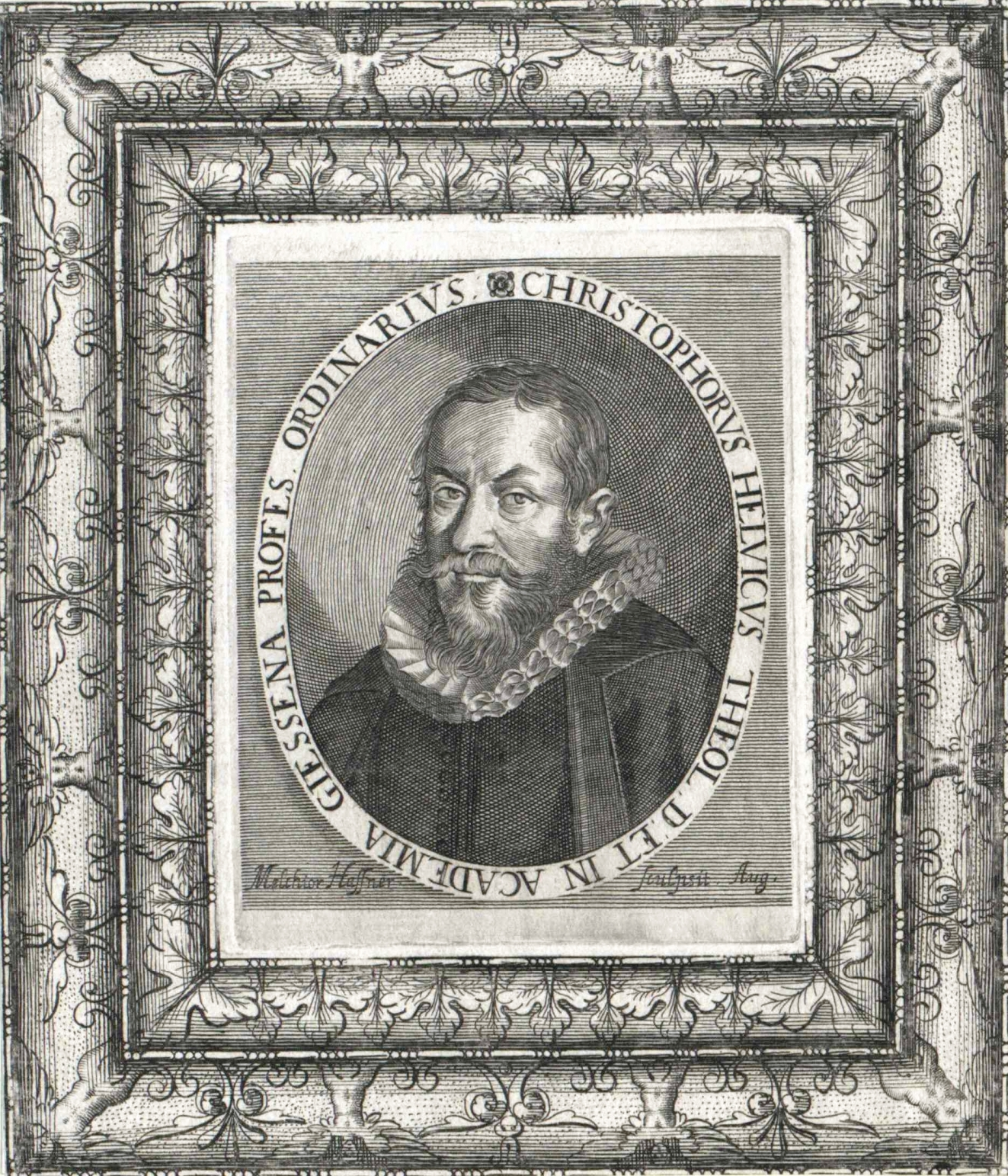 Christoph Helwig (1581–1617), deutscher Philologe und Historiker. Kupferstich